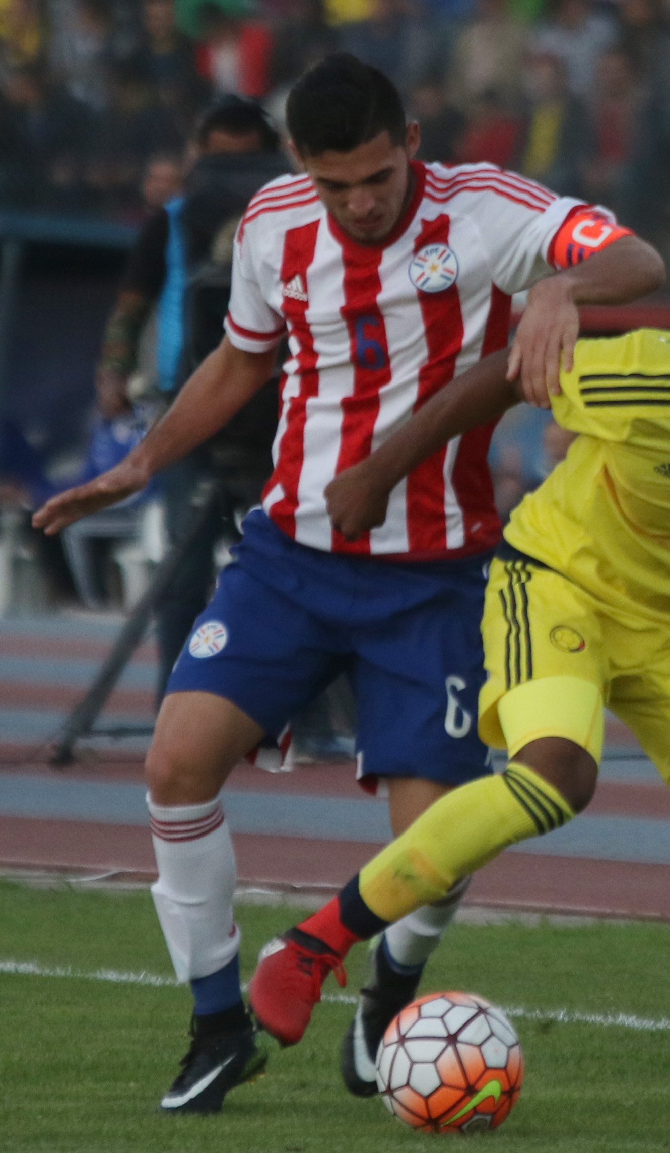 Riobamba, Ecuador, 18 enero 2017 (Andes).- Las selecciones nacionales de Paraguay y Colombia igualaron 1-1 este miércoles en el estadio Olímpico de Riobamba (centro andino) en el inicio del Campeonato Sudamericano Sub 20 Ecuador 2017. ANDES/Micaela Ayala V.